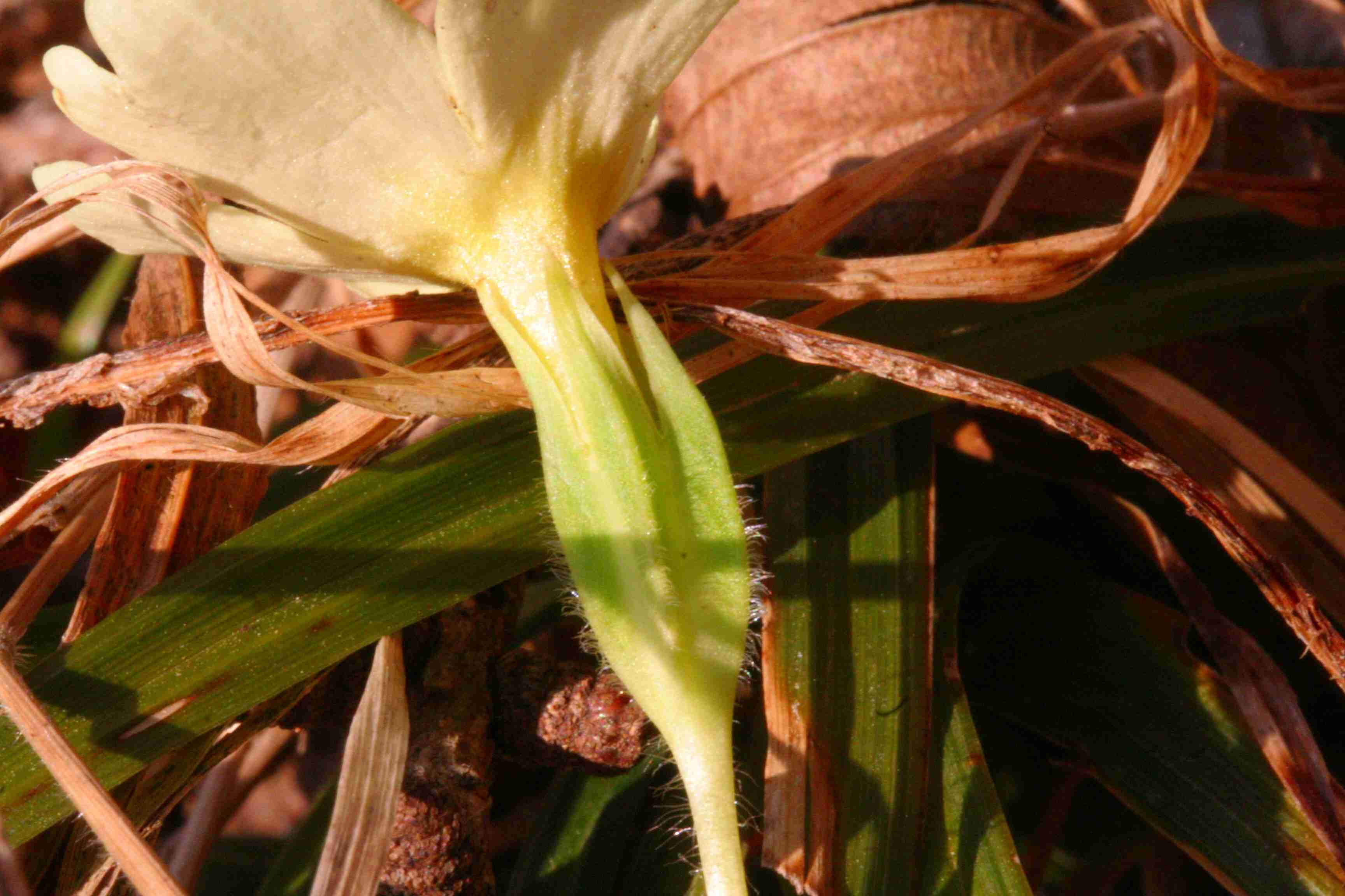 Primula_vulgaris (Primula comune)